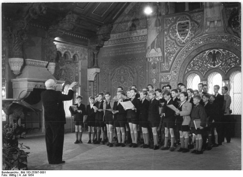 Zentralbild Wittig (TBD) 6.7.54. Gesamtdeusches Dichtertreffen auf der Wartburg. Ein gesamtdeutsches Dichtertreffen wurde am 4.7.1954 im Festssaal des Palas auf der Wartburg bei Eisenach feierlich eröffnet. Etwa 120 Dichter und Schriftsteller aus beiden Teilen Deutschlands nahmen an den dreitägigen Beratungen teil, die unter dem Motto "Vom Brückenschlag des Wortes" stehen. UBz: Mitglieder des Dresdener Kreuzchores singen zur feierlichen Eröffnung der Tagung.